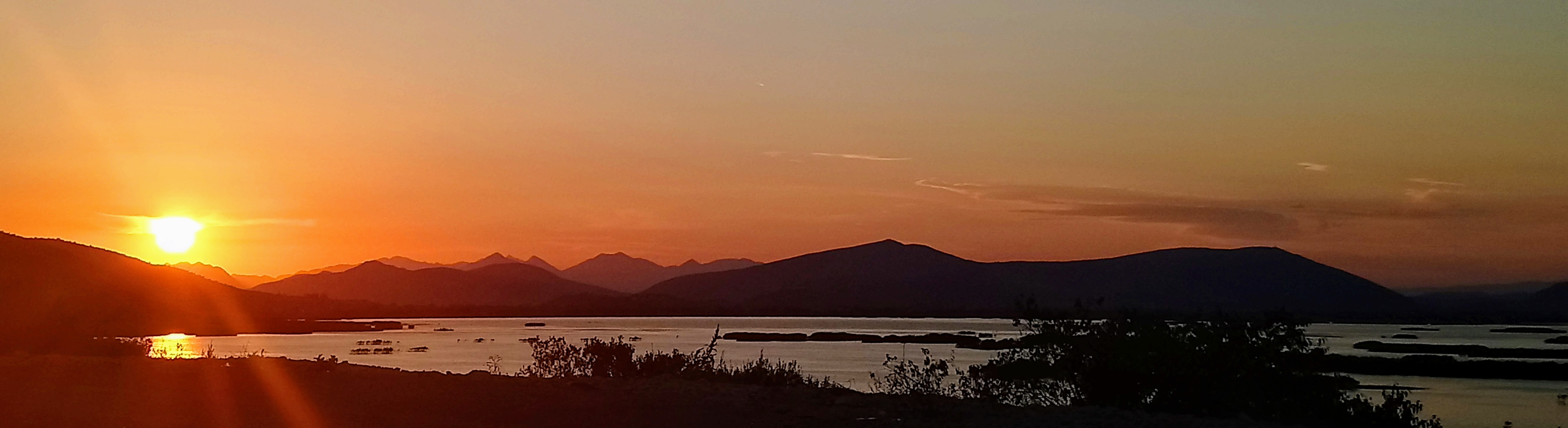 Zachód słońca nad Hutovo Blato, Čapljina, Federacja Bośni i Hercegowiny, Bośnia i Hercegowina